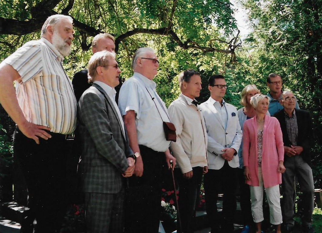 Suomalaisia olympiavoittajia 29. kesäkuuta 2016 kokoonnuttaessa Turun hautausmaalle haudattujen olympiavoittajien hautakiviin sijoitettujen olympiarenkaiden paljastustilaisuudessa. Vasemmalta Juha Mieto, Pertti Ukkola, Tapio Korjus (takana), Pekka Vasala, Kaarlo Kangasniemi, Tomi Poikolainen, Marja-Liisa Kirvesniemi (takana), Marjut Rolig, Pertti Karppinen ja Eugen Ekman.